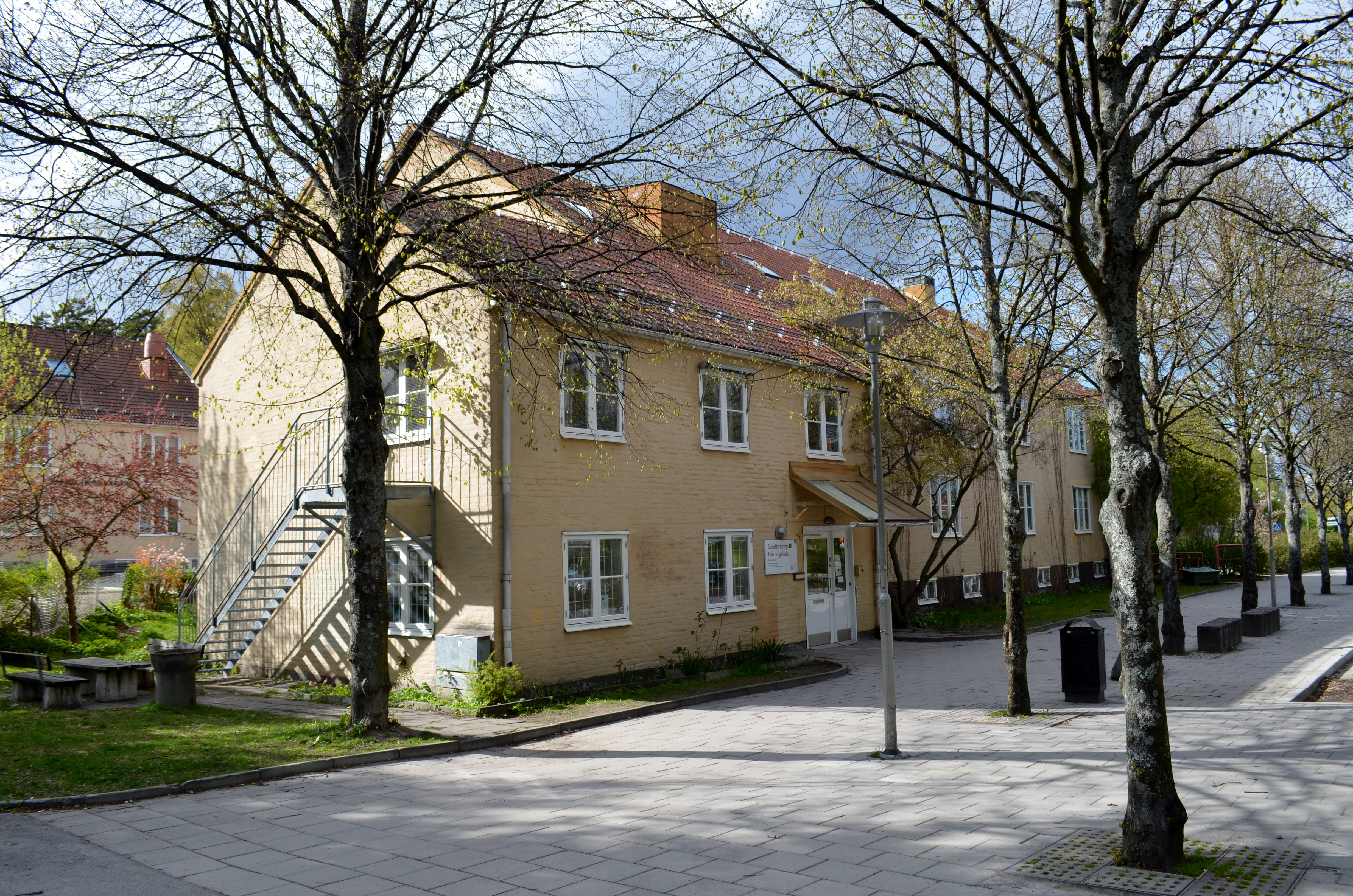 Före detta kasern vid Svea artilleriregemente i Rissne, Sundbyberg.